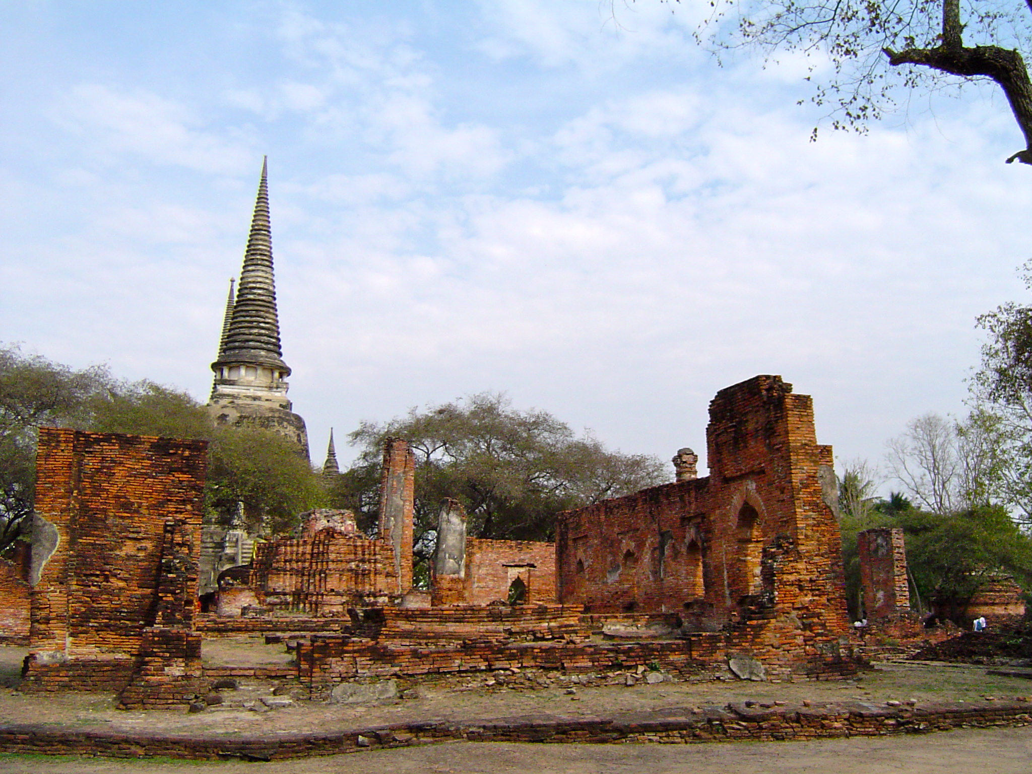 ภาพถ่ายสถานที่ภายในพระราชวังหลวงหรือพระราชวังโบราณ